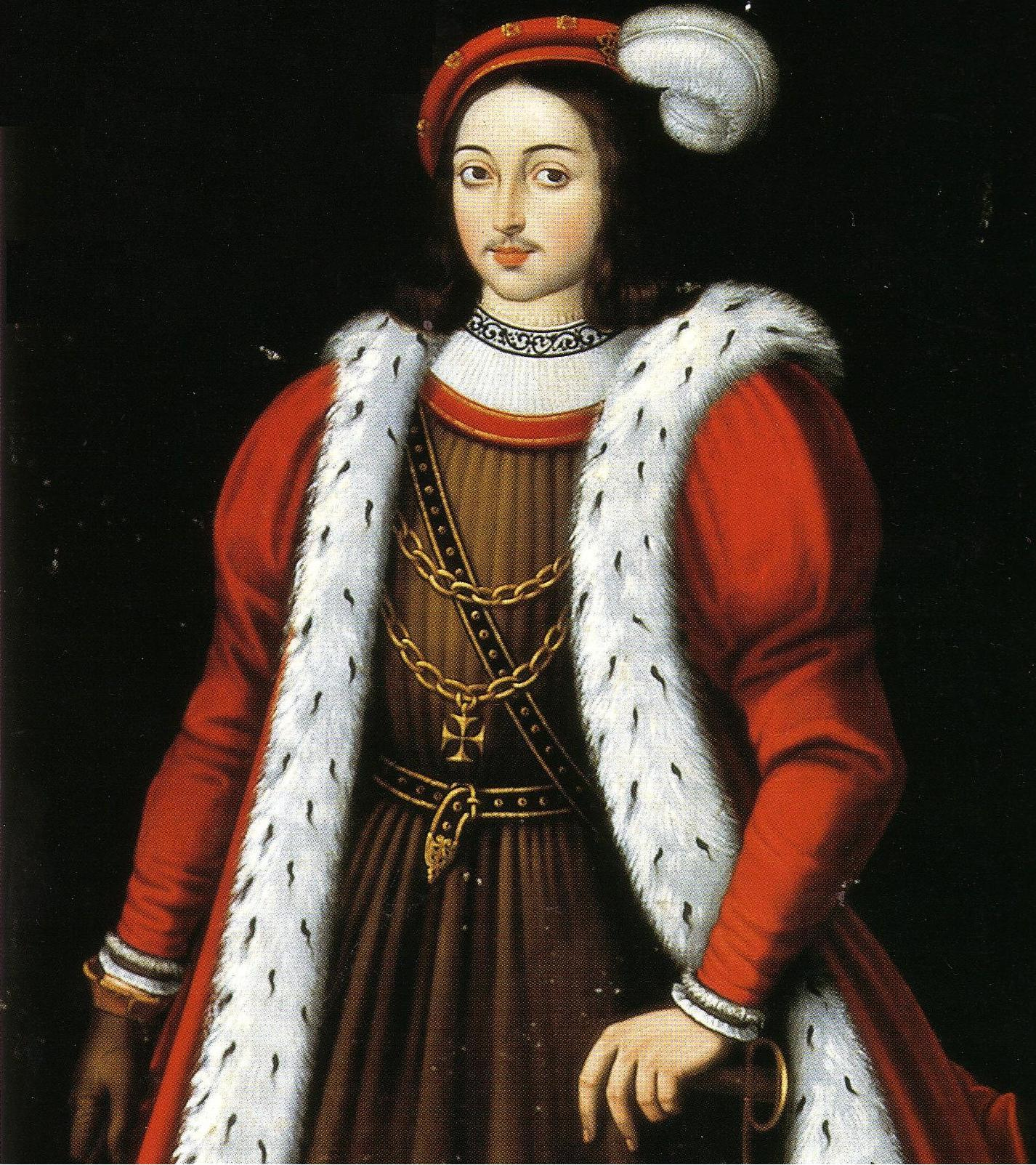 Retrato del Conde Ansurez, Sala de Recepciones del Ayuntamiento de Valladolid